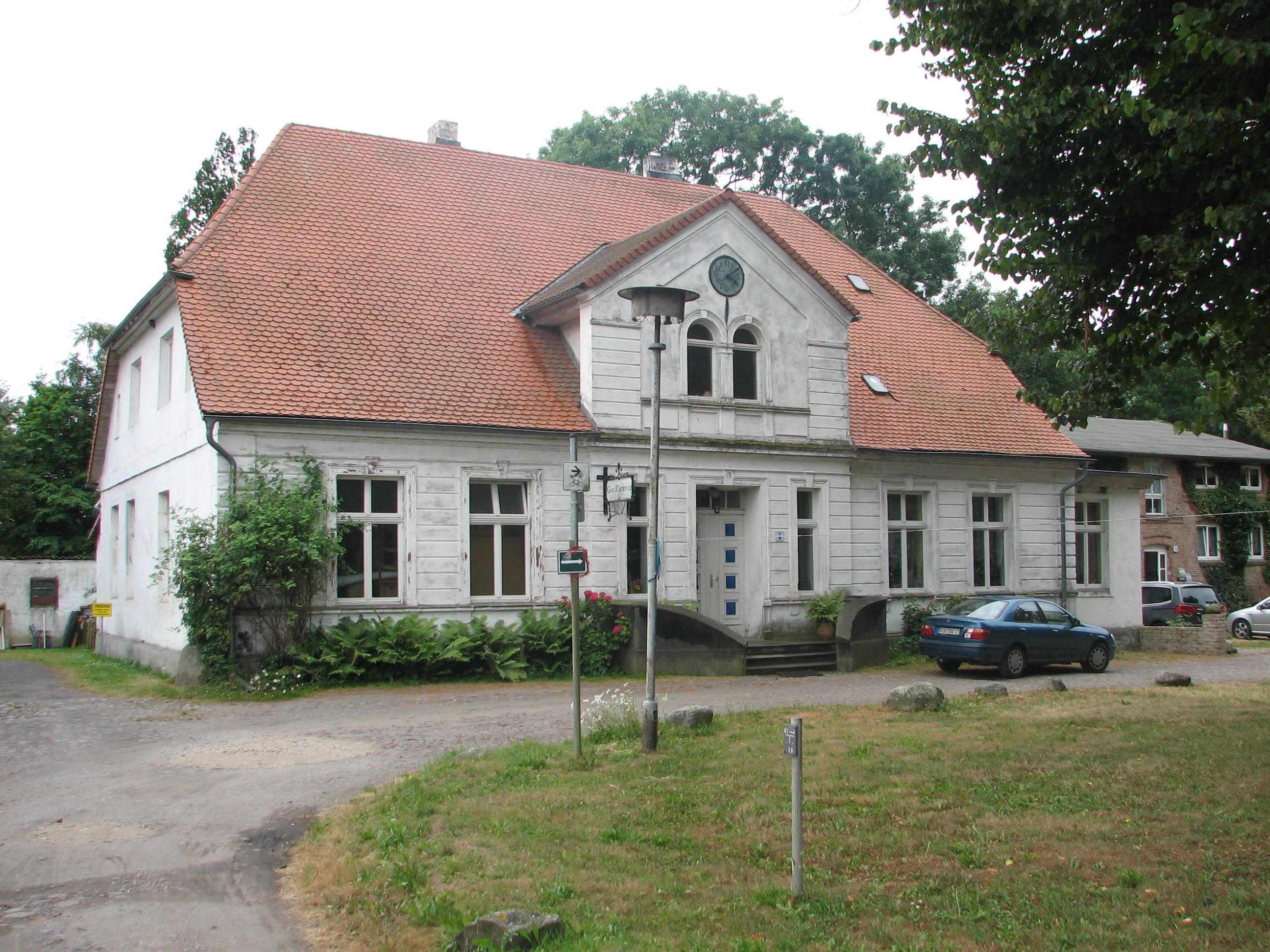 denkmalgeschütztes Gutshaus